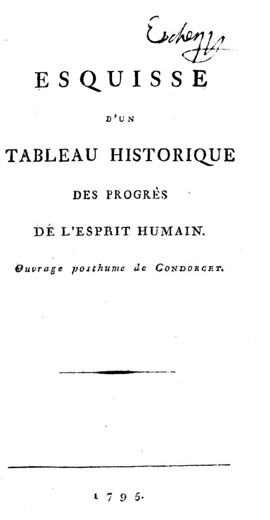 Esquisse d'un tableau historique des progres de l'esprit humain. Ouvrage posthume de Condorcet. - [Paris?] : [s.n.], 1795. - [2], 363 p. ; 8º .